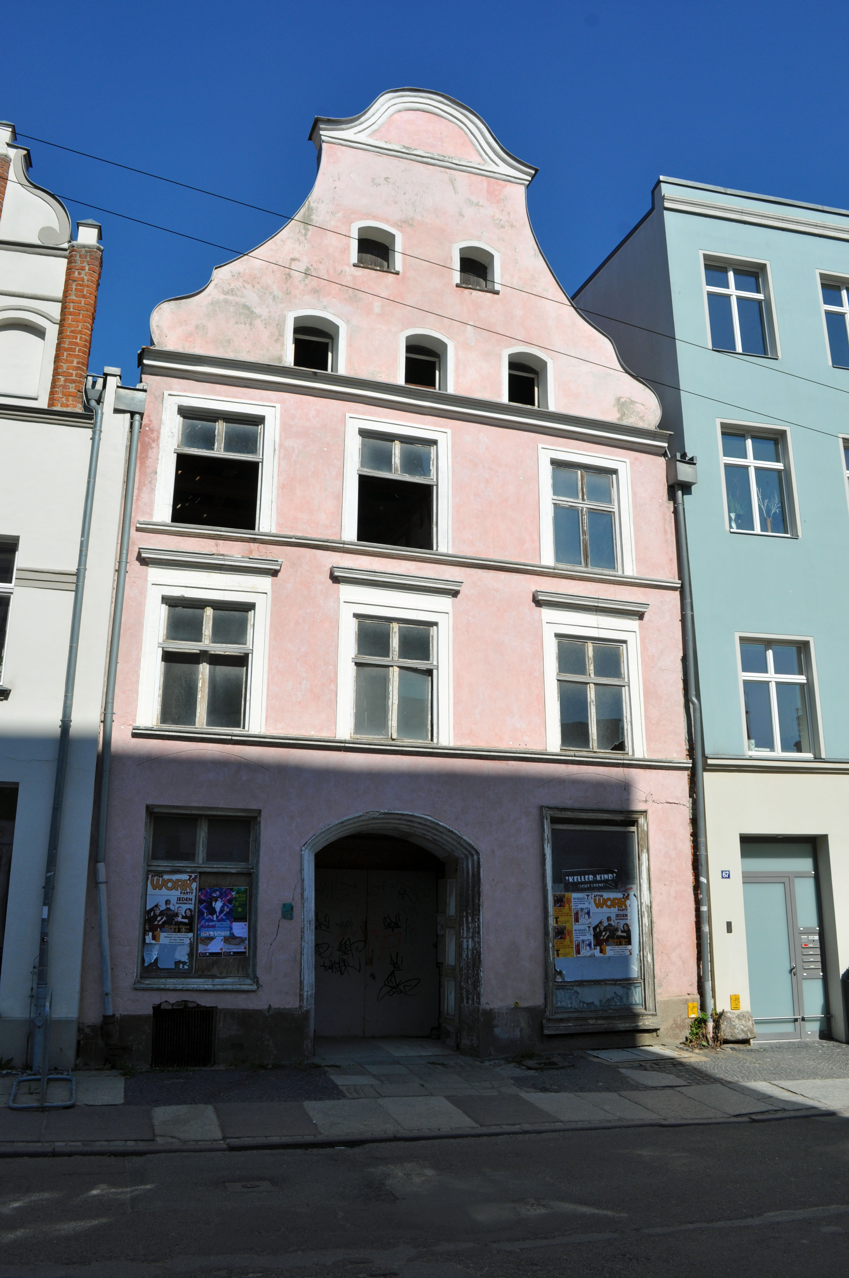 Gebäude bzw. Gebäudedetail in Stralsund. Straße und Hausnummer siehe Dateiname.